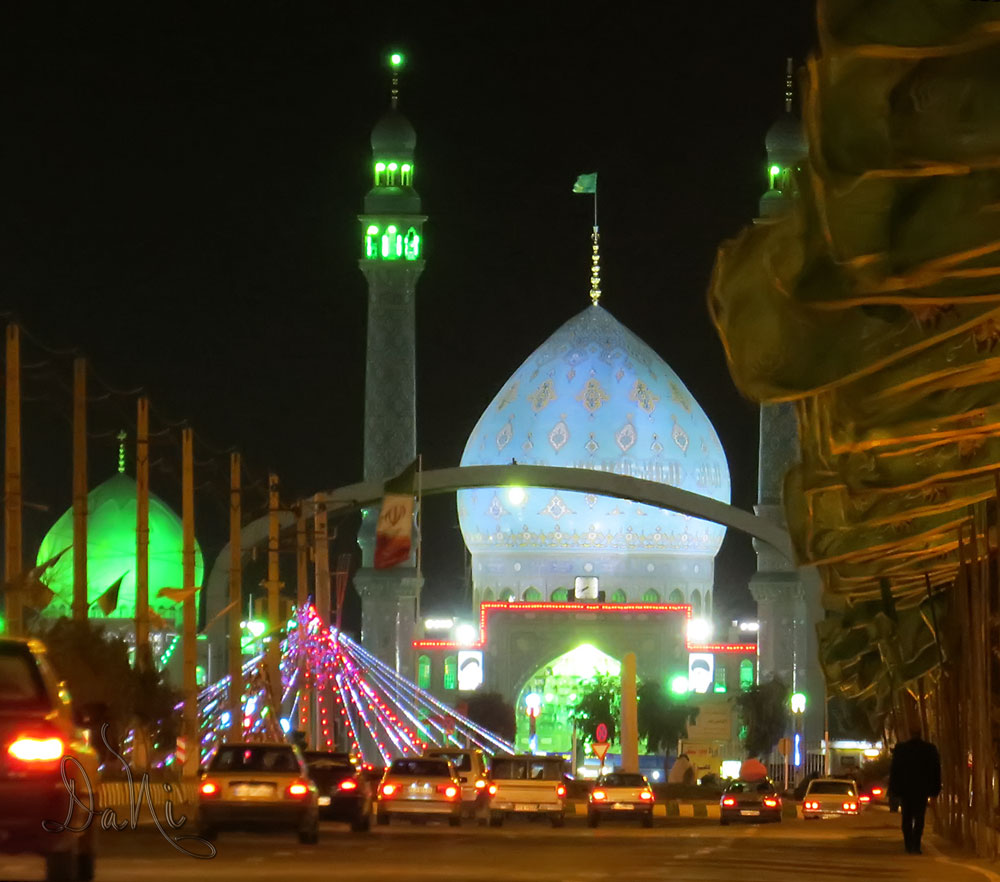 نمایی از مسجد جمکران از بلوار انتظار